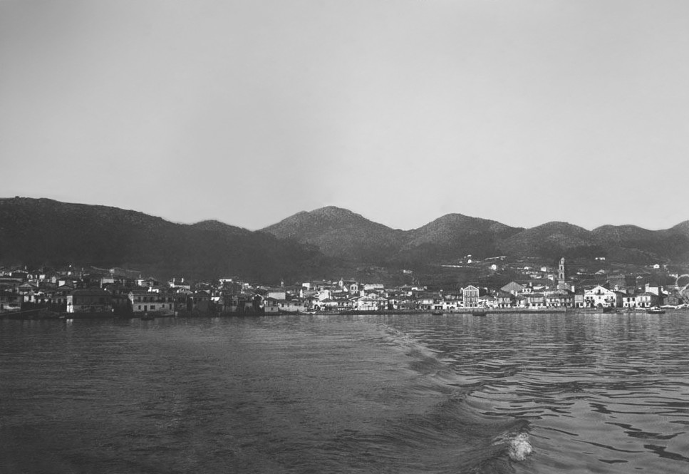 Imatge